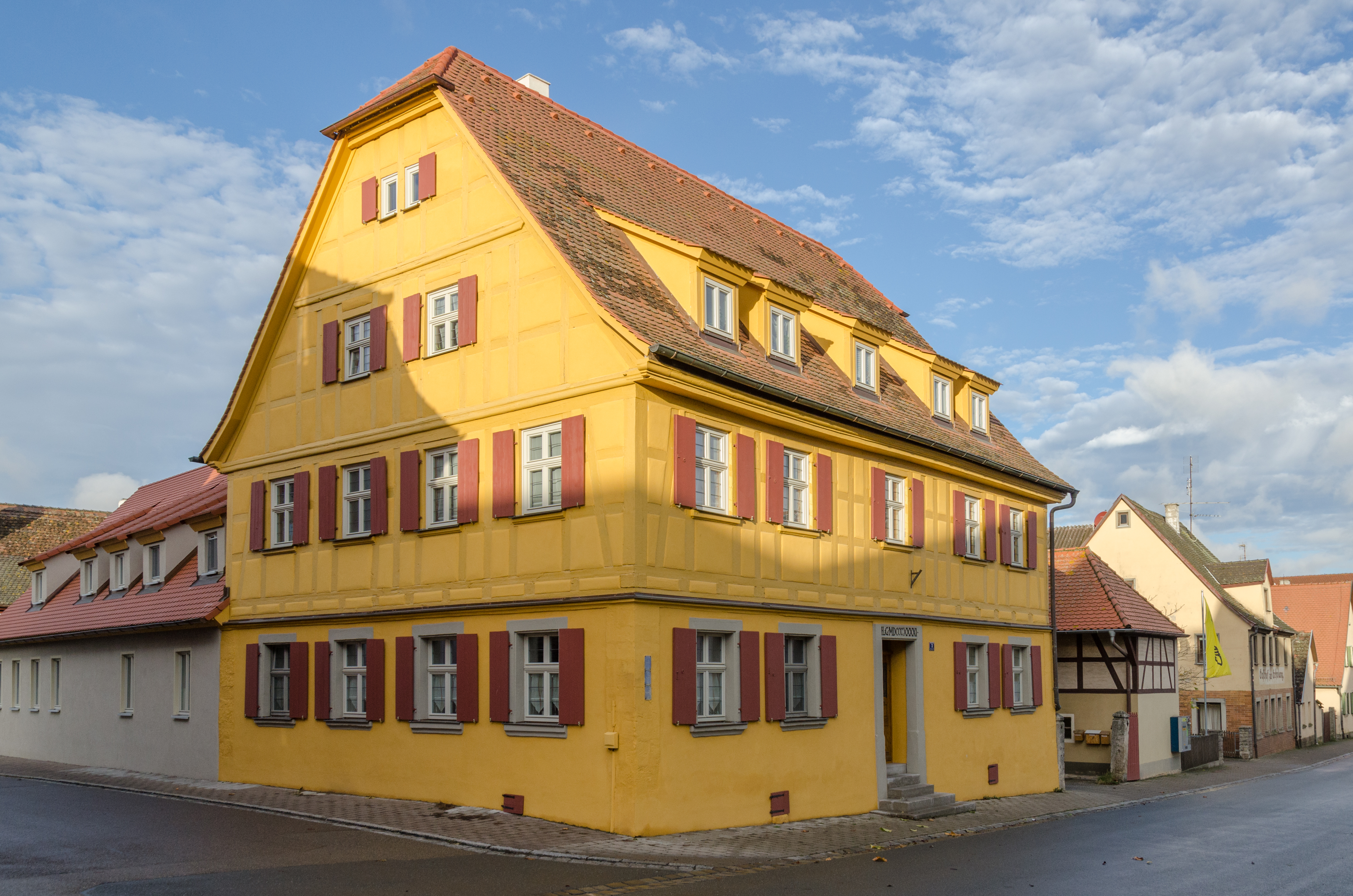 Marktbergel, Würzburger Straße 3